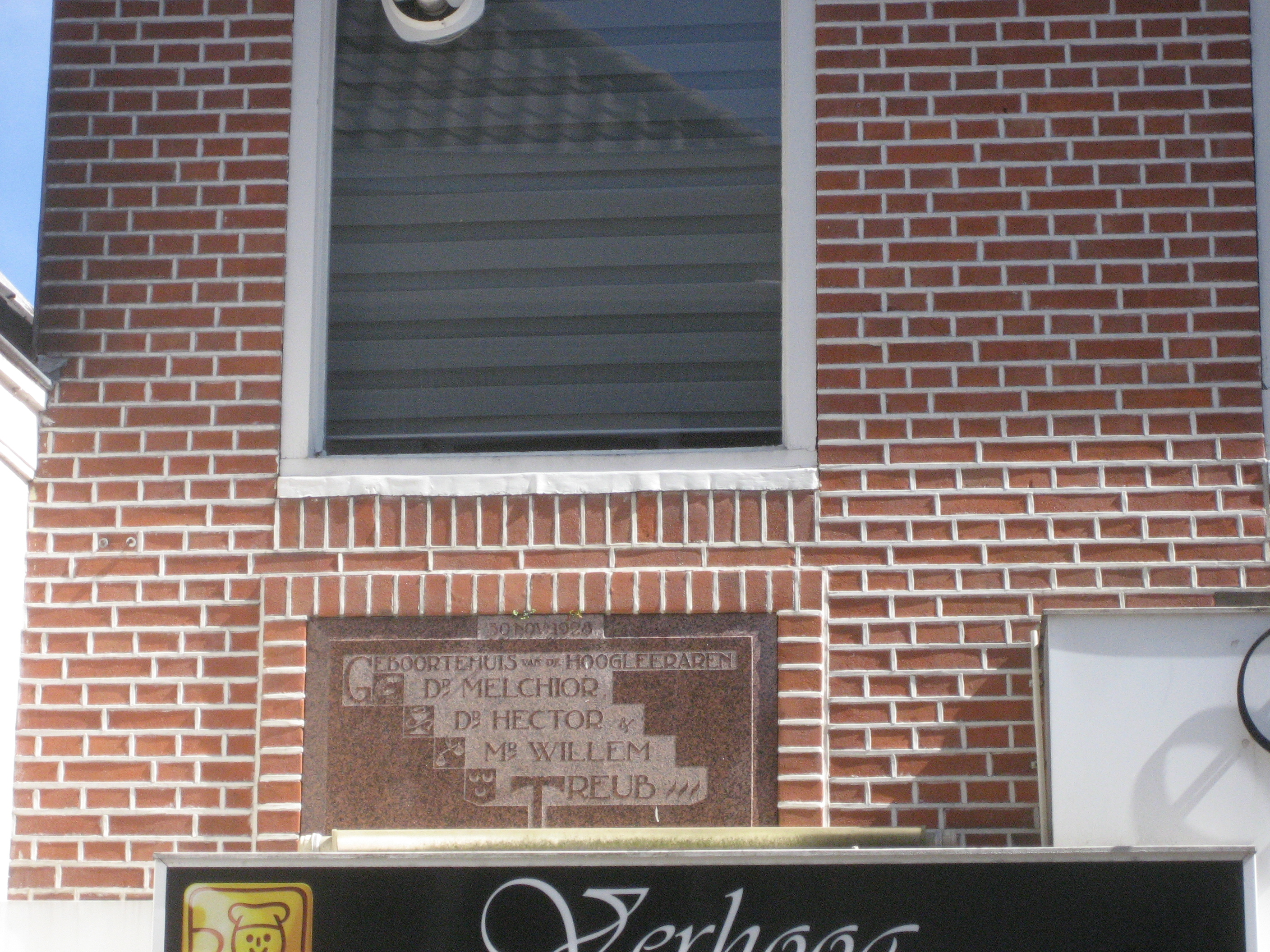 Bakkerij Verhoog, Treubstraat 15, Voorschoten. Tekst gevelsteen: "30 november 1928. Geboortehuis van de hoogleeraren Dr. Melchior [Treub], Dr. Hector [Treub], Mr. Willem Treub